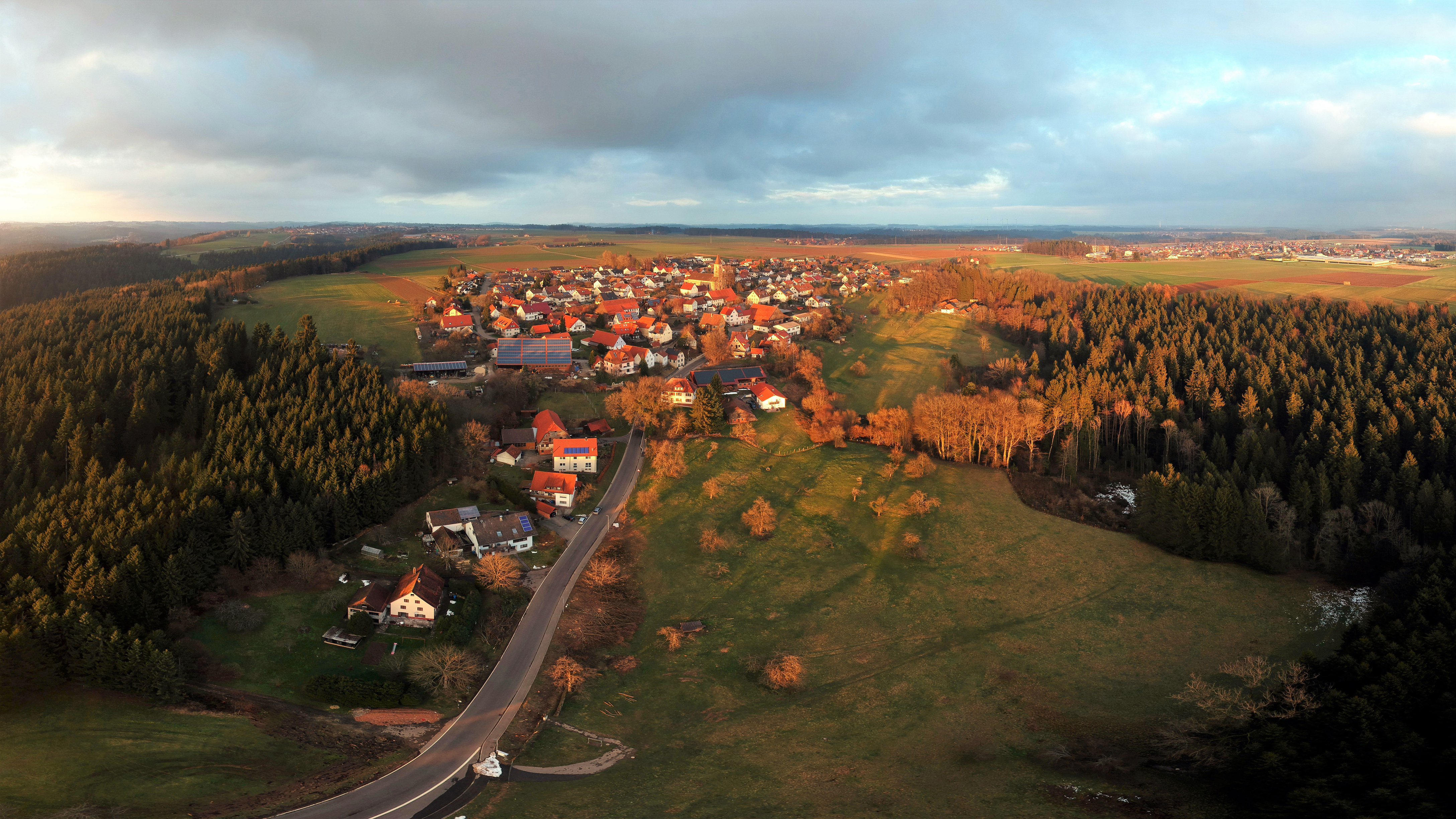 Panorama über Zimmerbach (Gemeinde Durlangen) Im Bildhintergrund: links Spraitbach, Mitte Tanau, rechts Durlangen